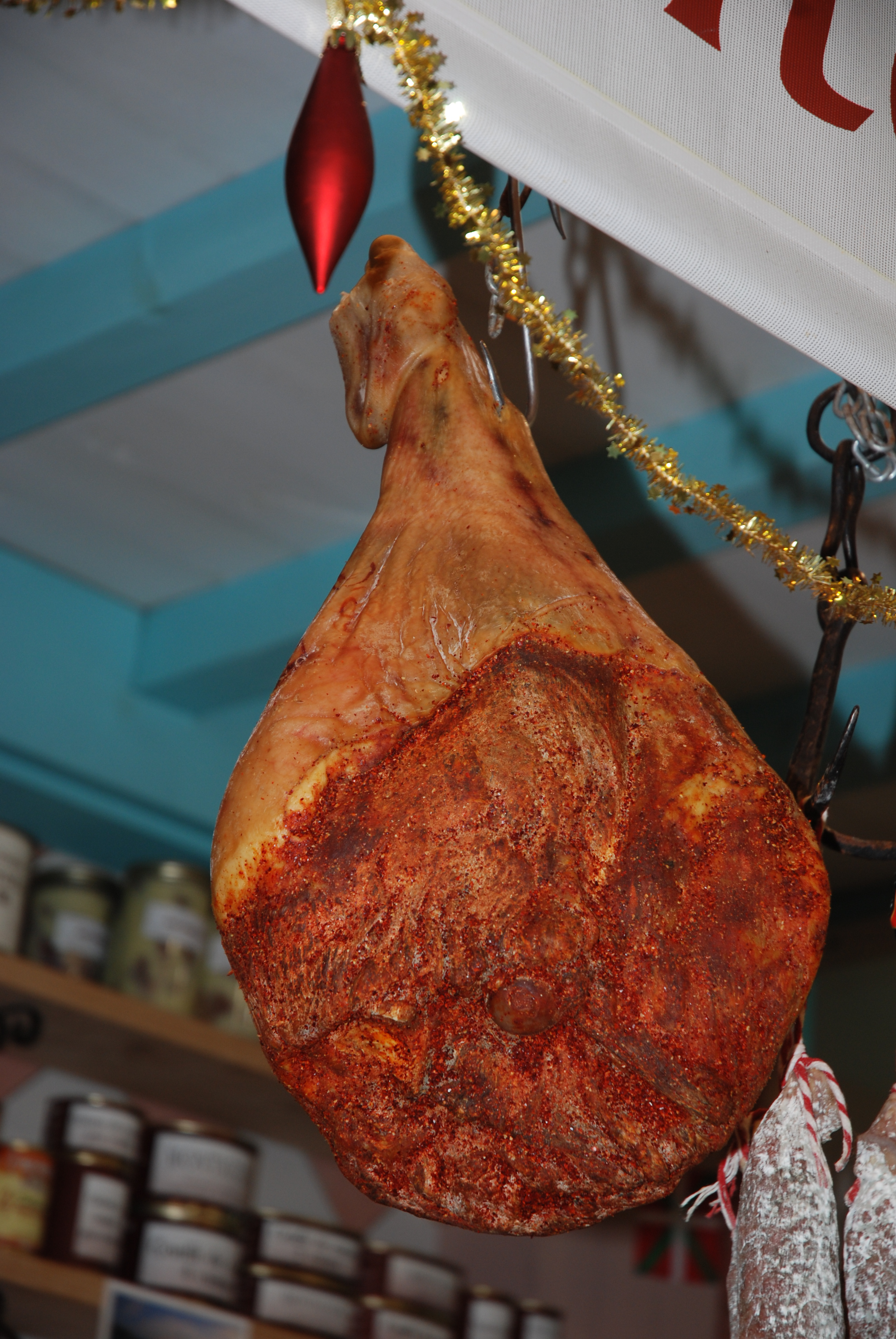 Jambon de Bayonne, marché de Saint-Jean-de-Luz